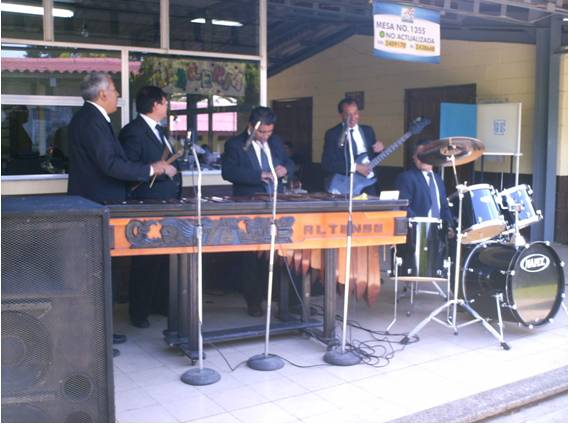 Marimba